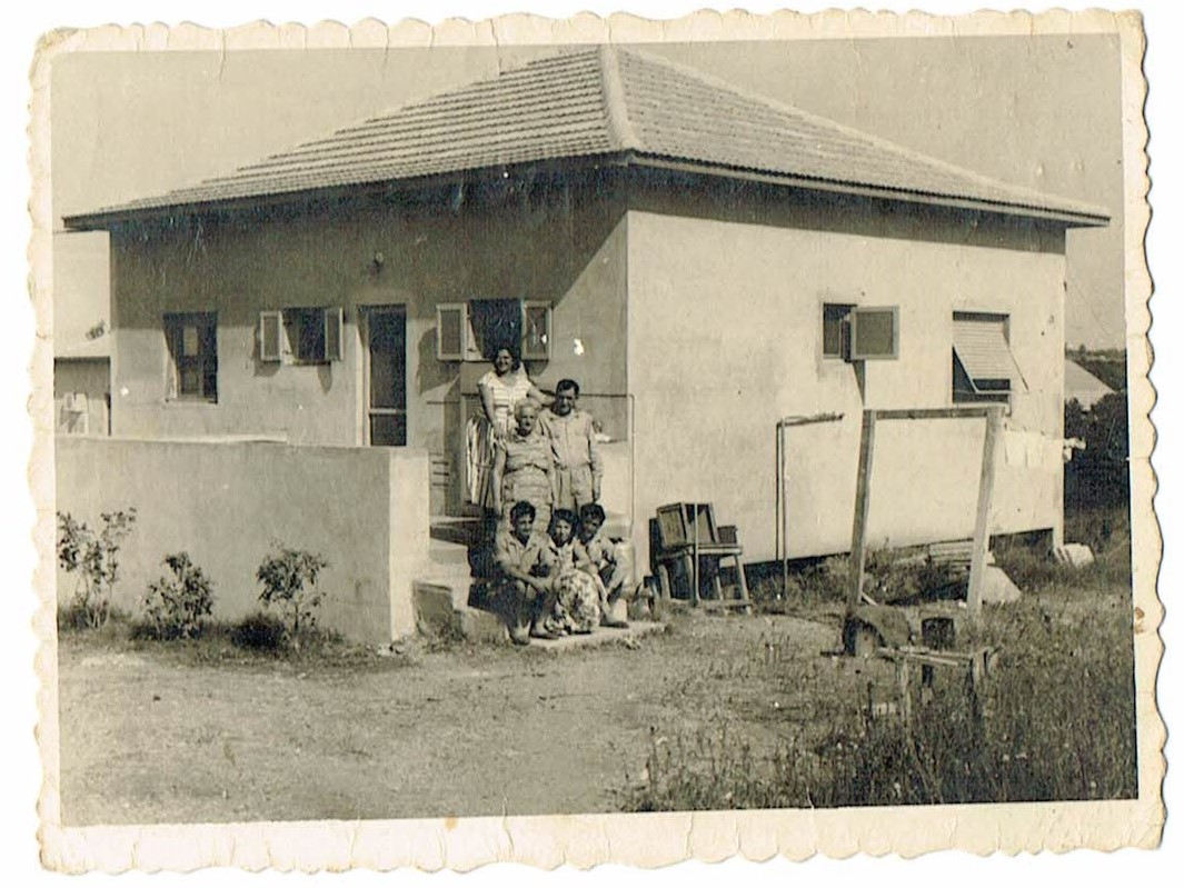 משפחת אלפנדרי בכפר הארון המתיישב 1960